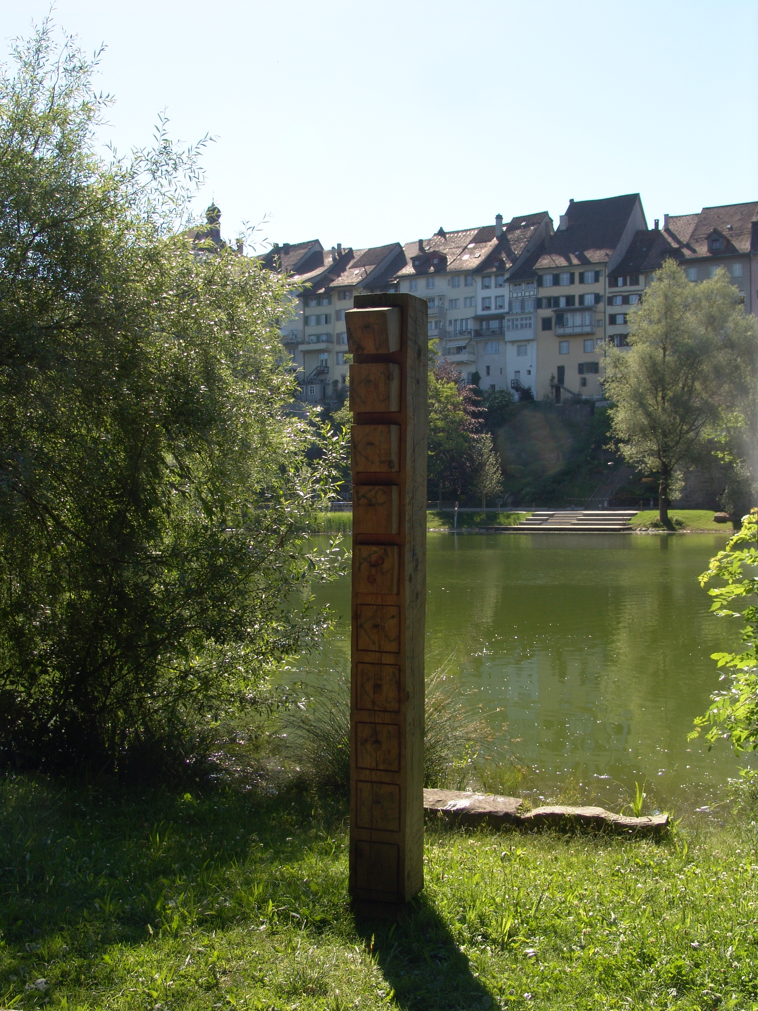 Wil, Weier